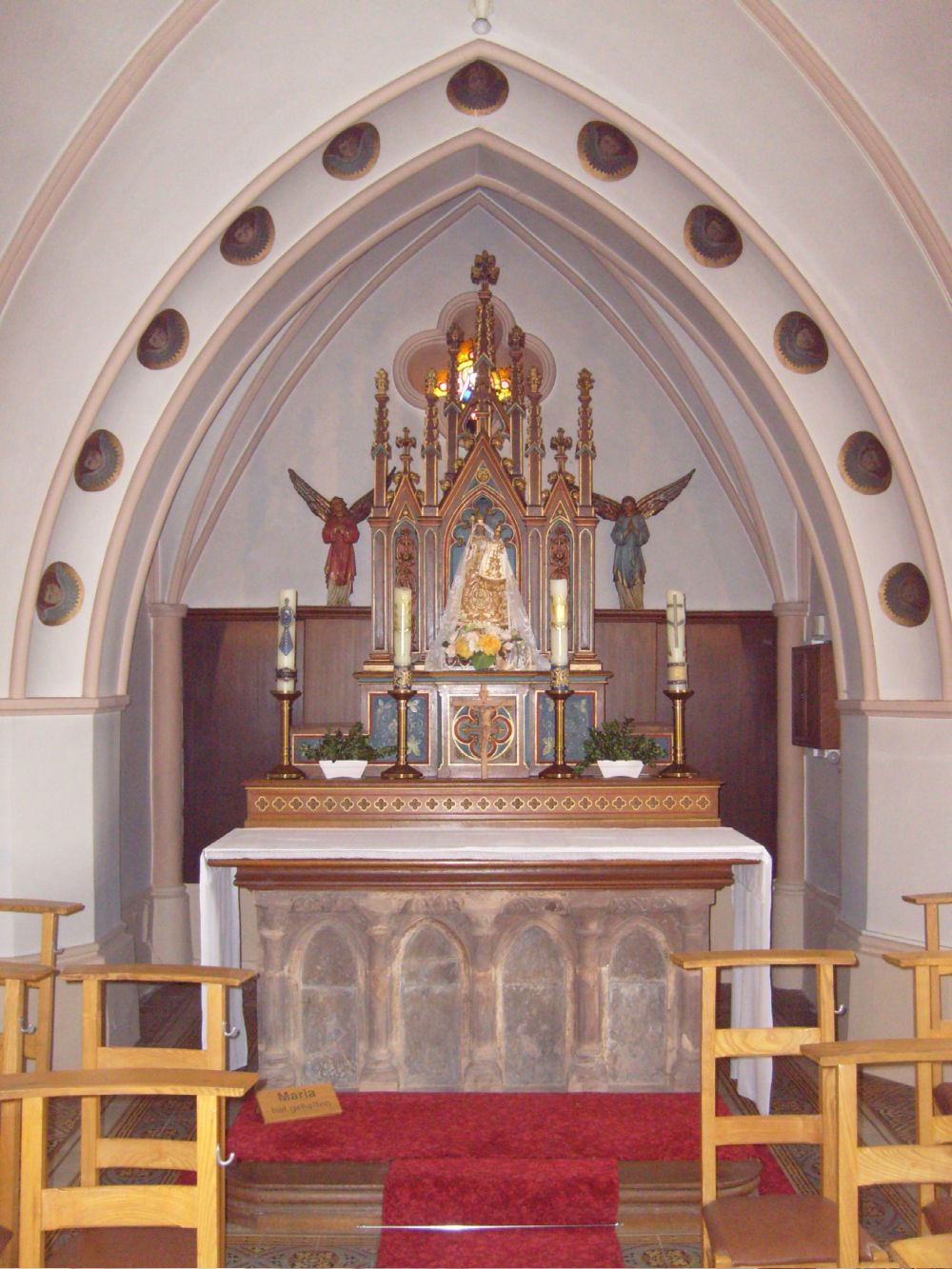 D'Veianer Bildchen, Bannenusiicht, 26. Mäerz 2008